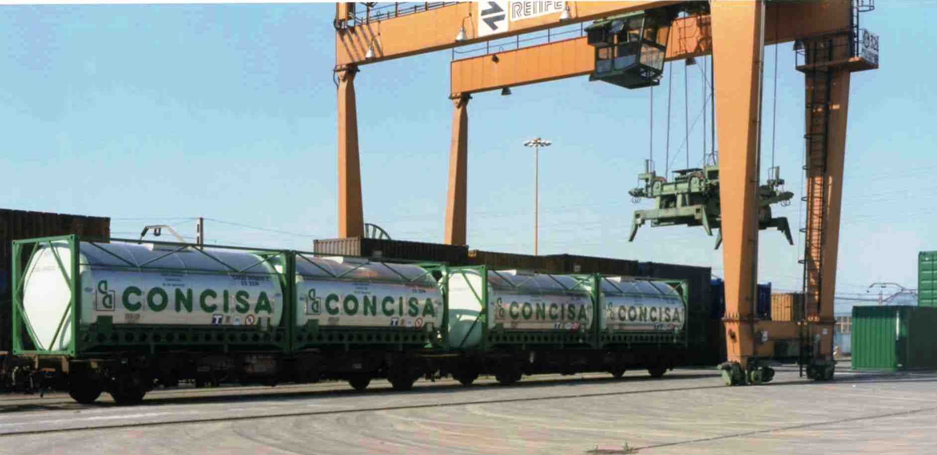 Grúa pórtico en la terminal ferroviaria de Lleida/Lérida(España)